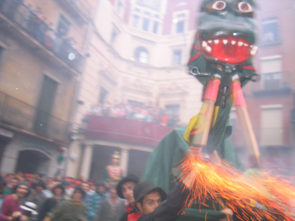 Patum, fiesta de Berga, Cataluña, España. Declarada patrimonio de la humanidad por la UNESCO.